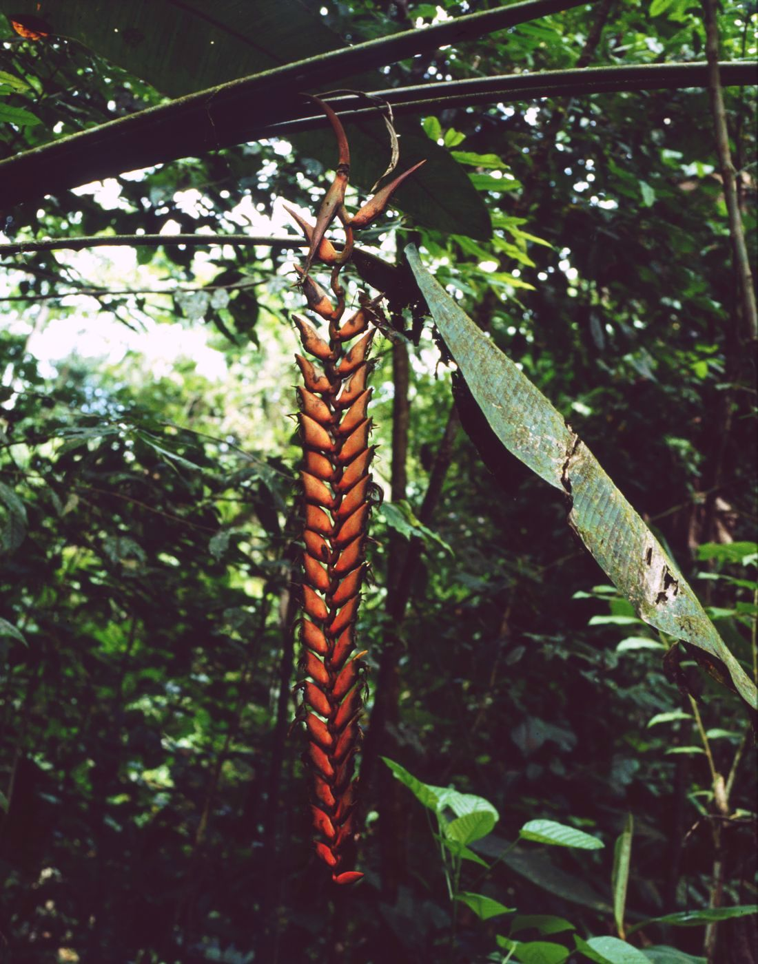 Heliconia stilesii, Heliconiaceae - Costa Rica: Prov. Puntarenas, PN Piedras Blancas, Bosque Esquinas bei La Gamba, "Catarata Trail"